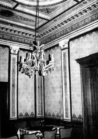 Blick in das Fürstenzimmer (Königssalon) des Bahnhofs Bad Kissingen